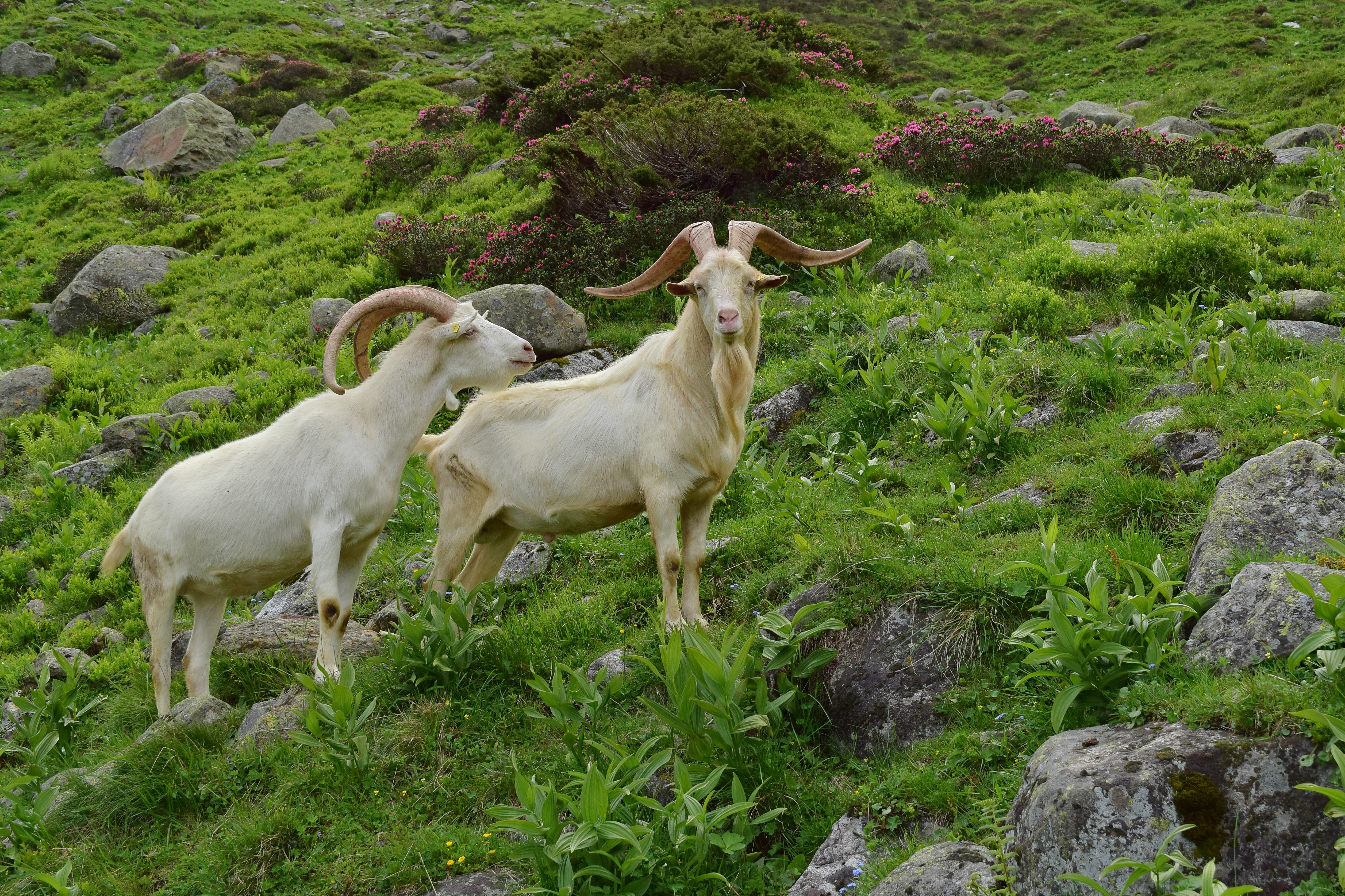 Weidende Ziegenböcke beim Abstieg vom Gletscherweg Innergschlöss. Der Weg führt entlang des Keesbachs, der heute kaum mehr Wasser führt, jedoch bis in die 1960er-Jahre den überwiegenden Teil des Schmelzwassers entwässert hat. This file shows the National Park Hohe Tauern in Austria.